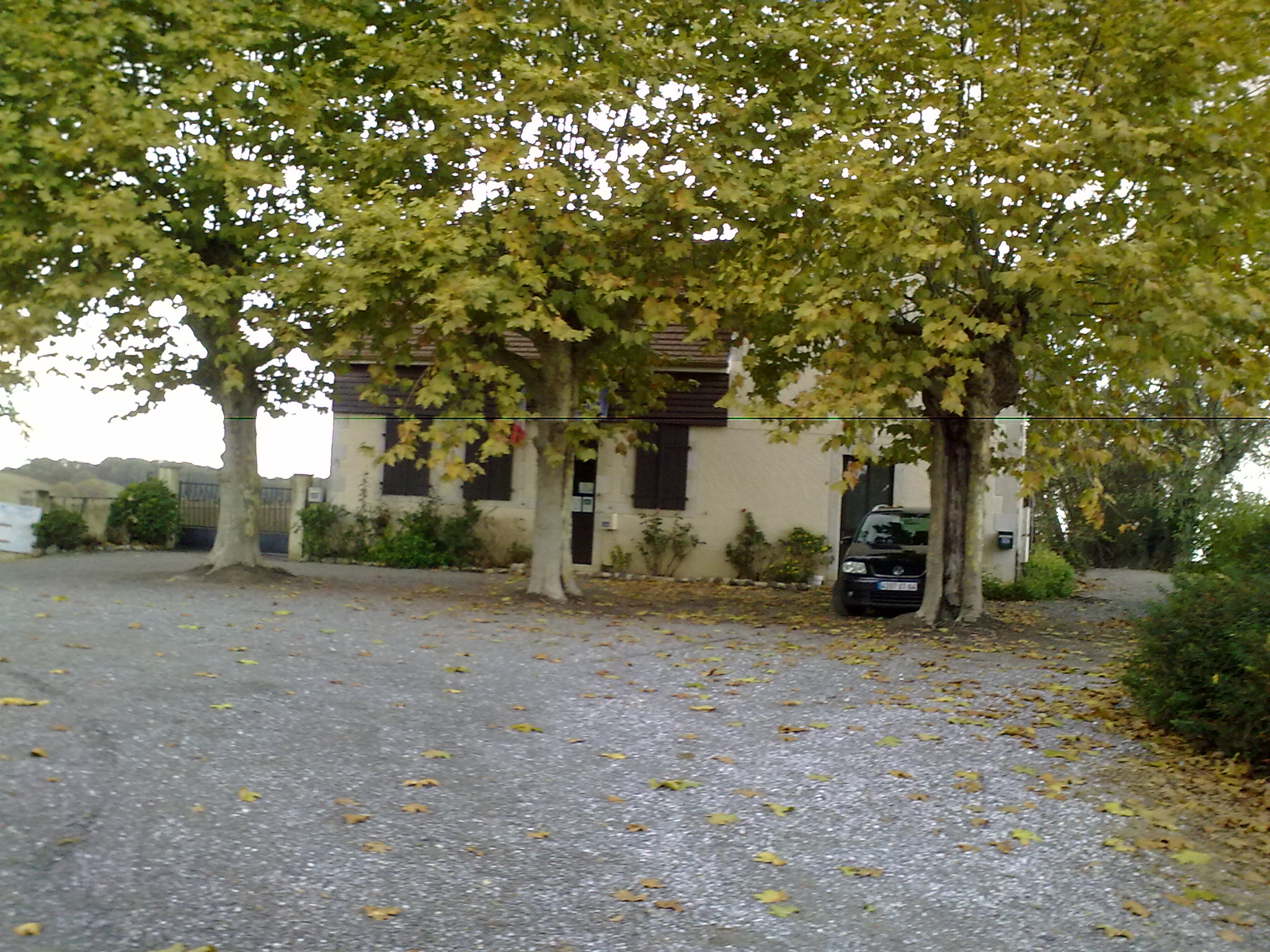 Doazon